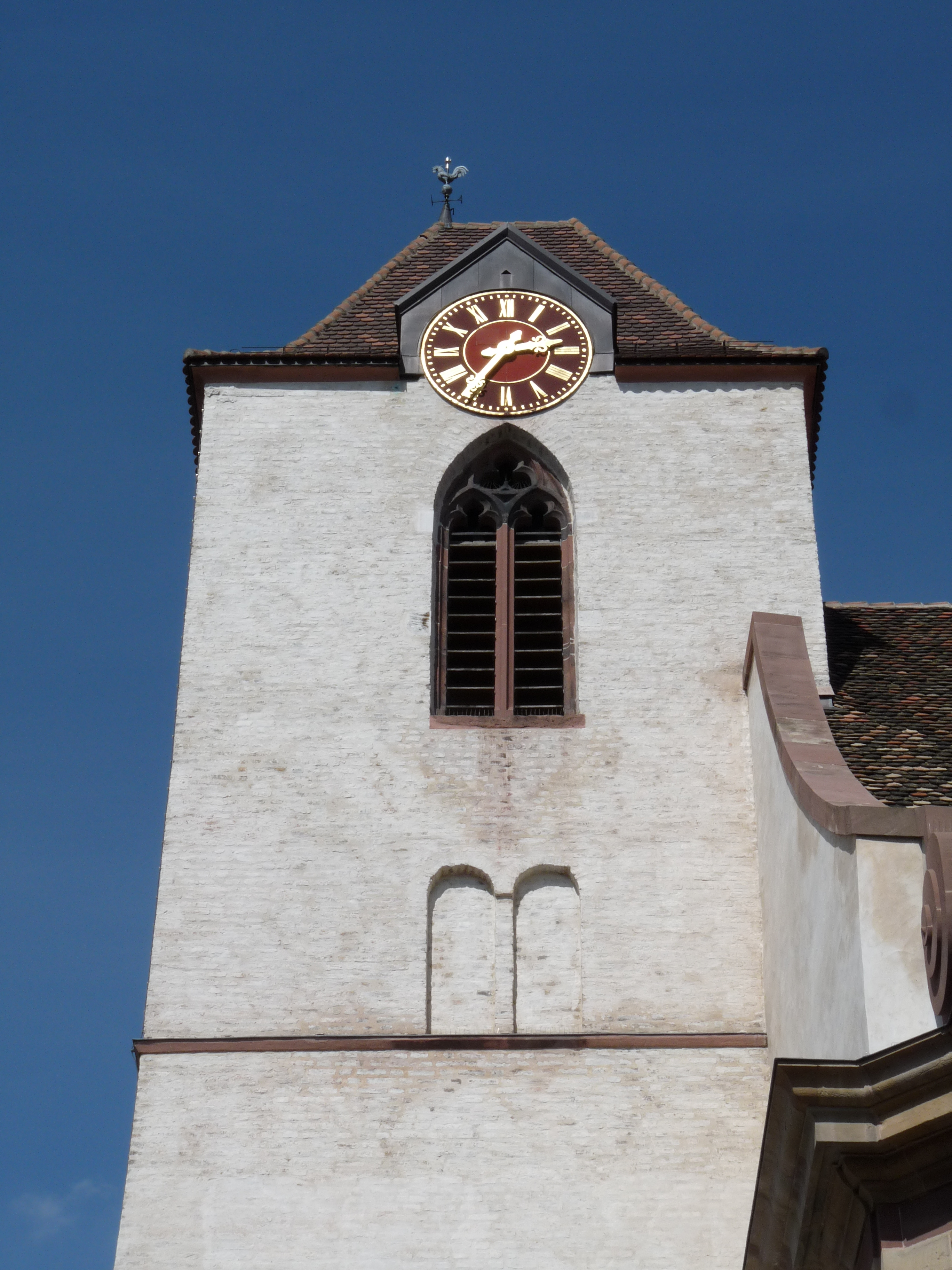 Clocher de l'église Sainte-Aurélie de Strasbourg. Horloge de Jean-Baptiste Schwilgué.